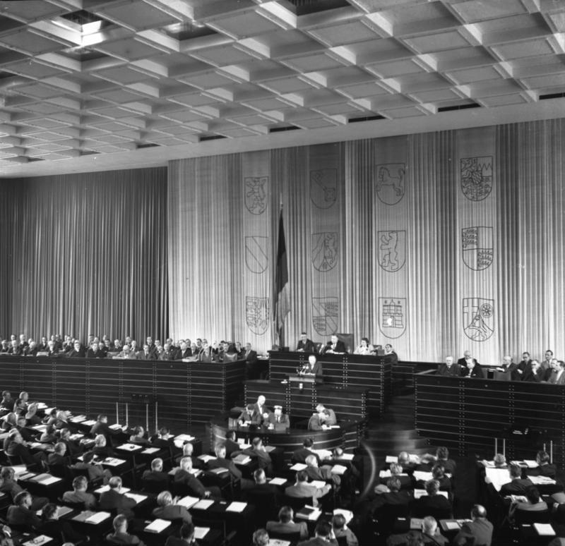 1. Wahlperiode 1949-1953: Wiedereinführung des Schumanplans am 7.1./9.1.1952 (?). Blick in den Bundestagssaal und auf die Ministerempore.